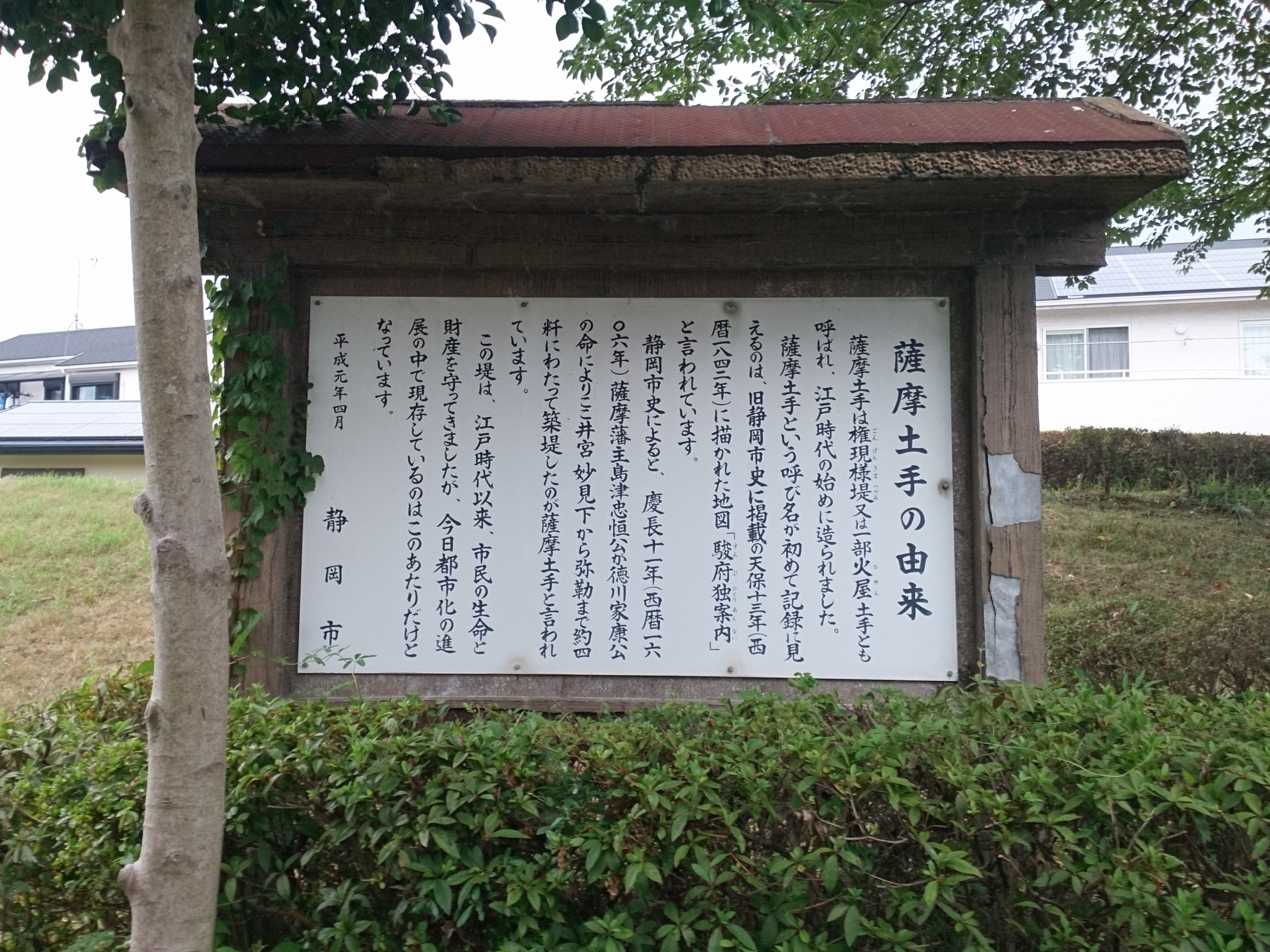 静岡県静岡市、薩摩土手の解説板（2018年8月8日撮影）